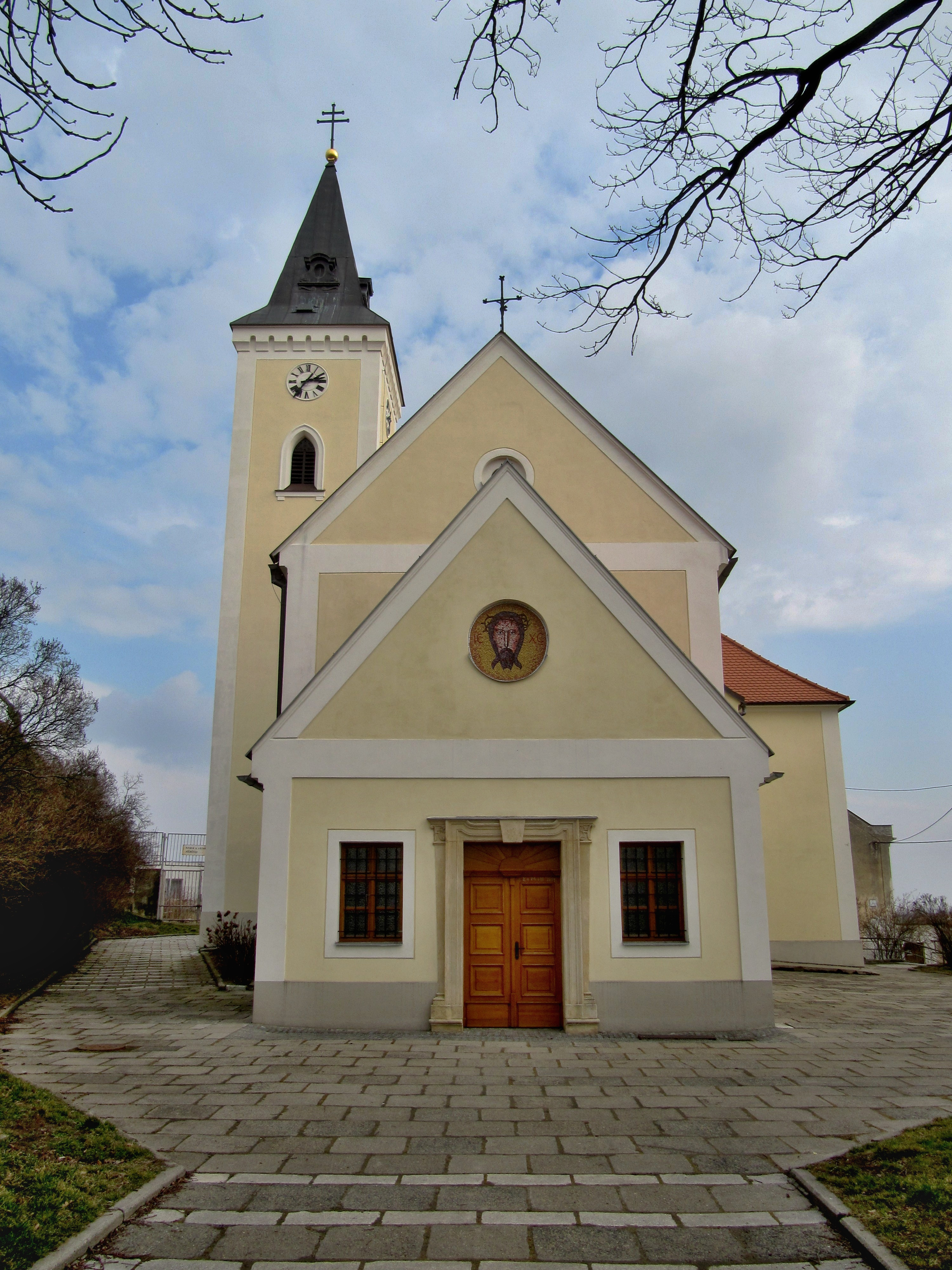 Znojmo, část Přímětice. Kostel sv. Markéty.